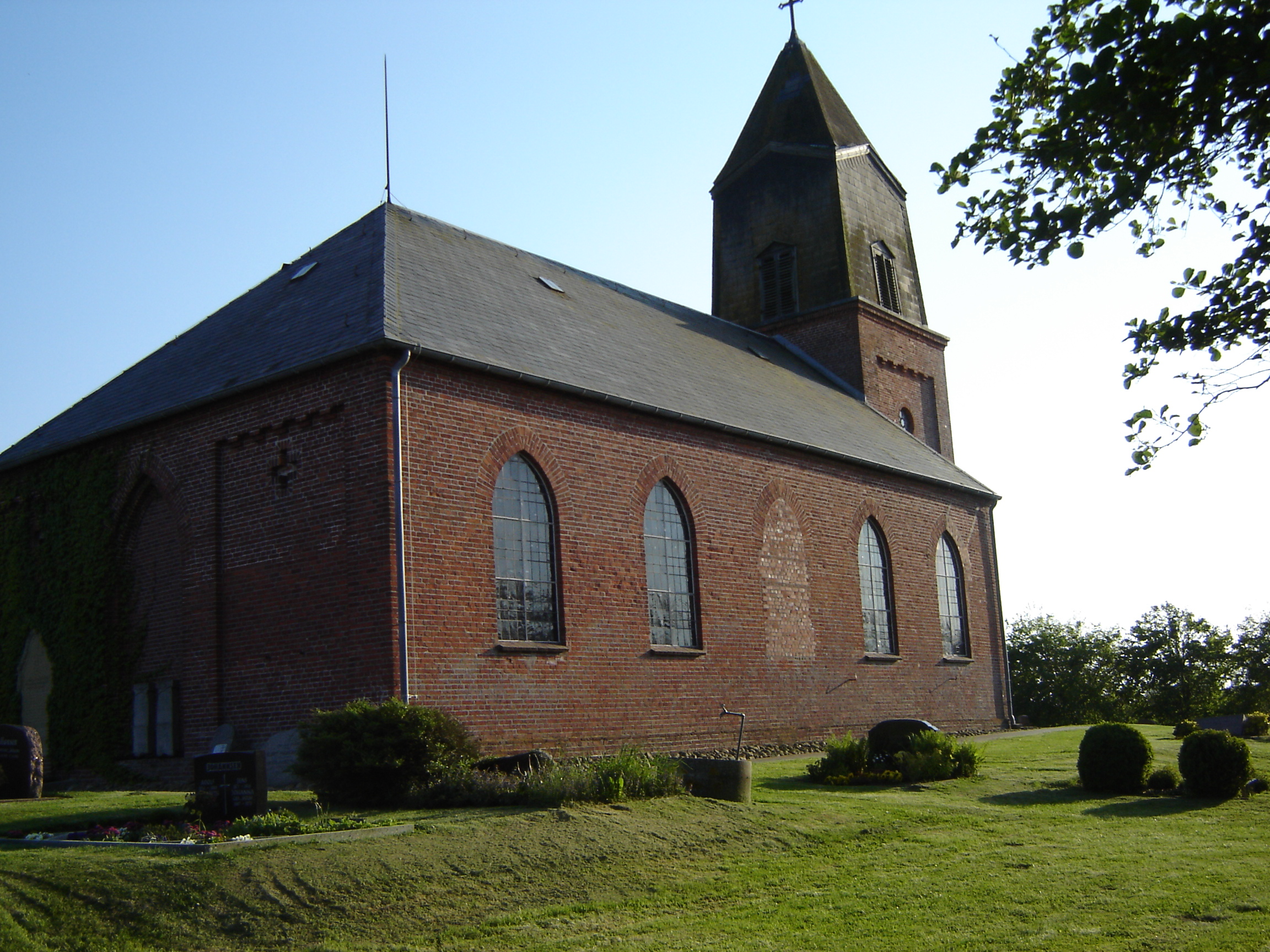 Die St. Nikolaikirche in Uelvesbüll (Kreis Nordfriesland, Bundesland Schleswig-Holstein, Deutschland). Nachdem der Vorgängerbau 1854 wegen Baufälligkeit abgerissen worden war, wurde binnen eines halben Jahres der klassizistisch-neugotische jetzige Backsteinbau errichtet und am 6. Oktober 1854 eingeweiht. Weil der dänische König Friedrich VII. einen Baukostenzuschuss gewährte, trug die Kirche von 1854 bis 1964 den Namen Friedrichskirche.